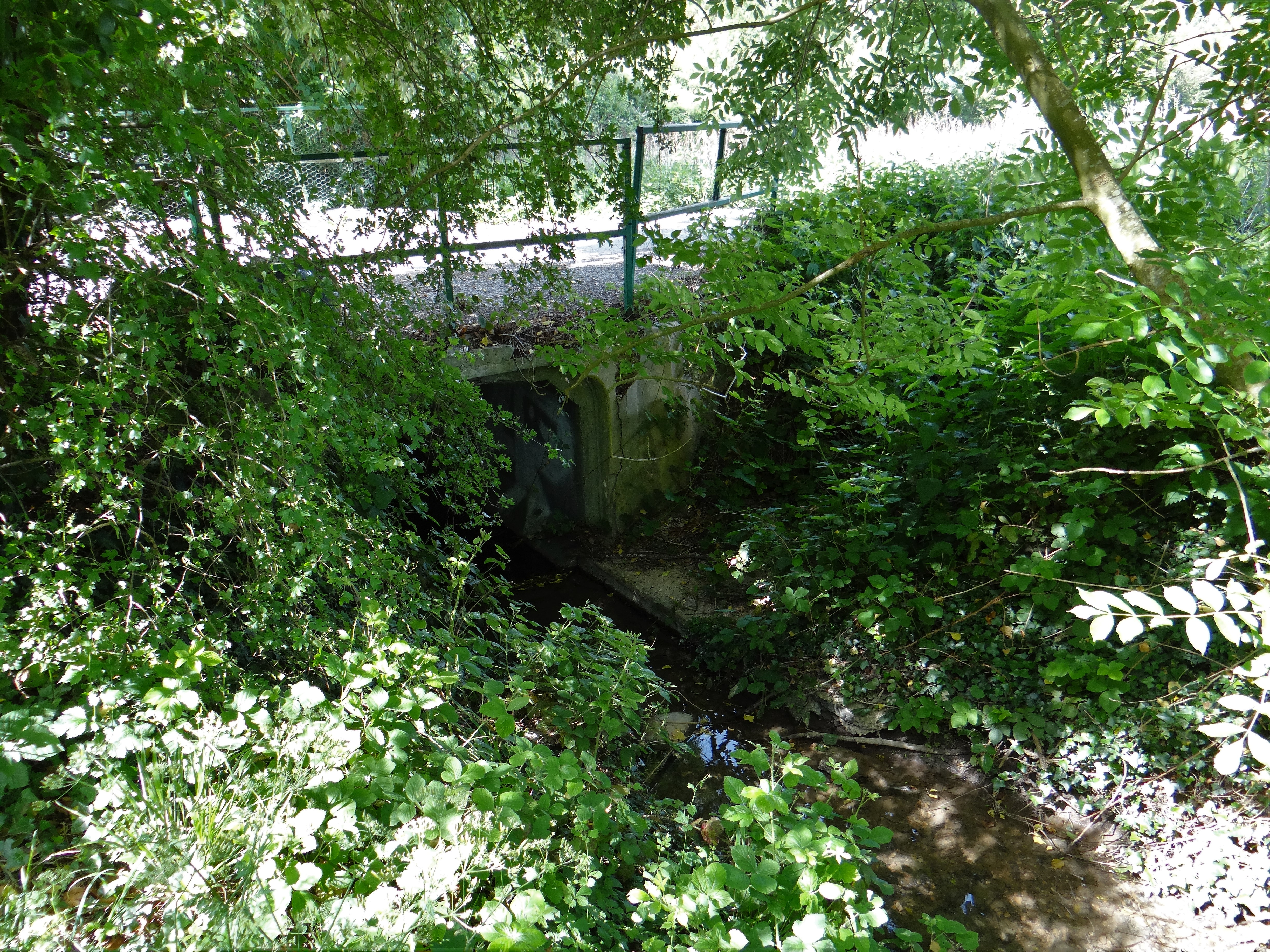 Le ru du Bouillon, rue Carnot, 77400 Thorigny-sur-Marne, France